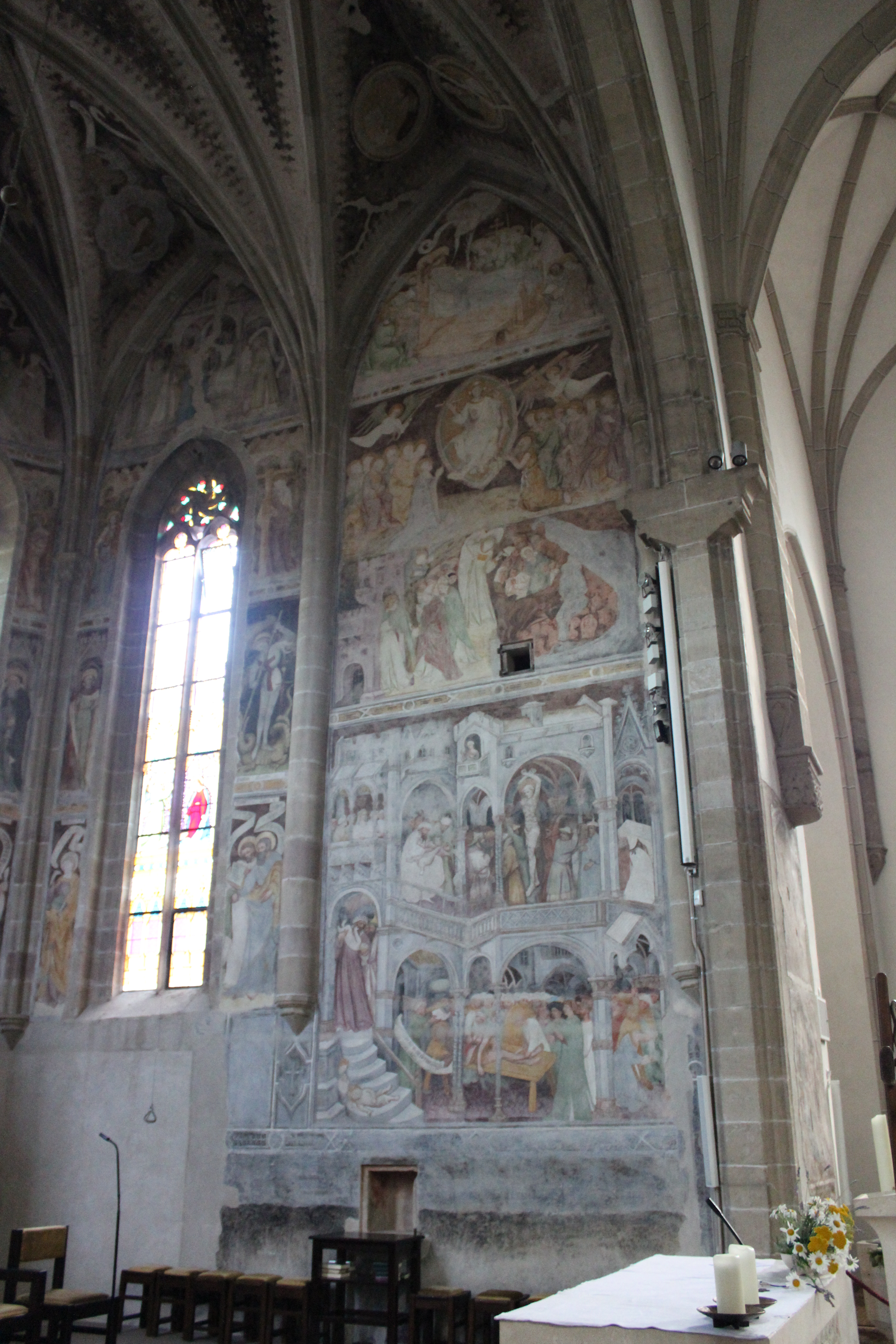 Pfarrkirche St. Quirikus und Julitta in Tramin - Fresken rechts vom Altar